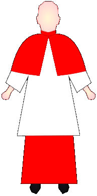 Strój ministranta czerwony